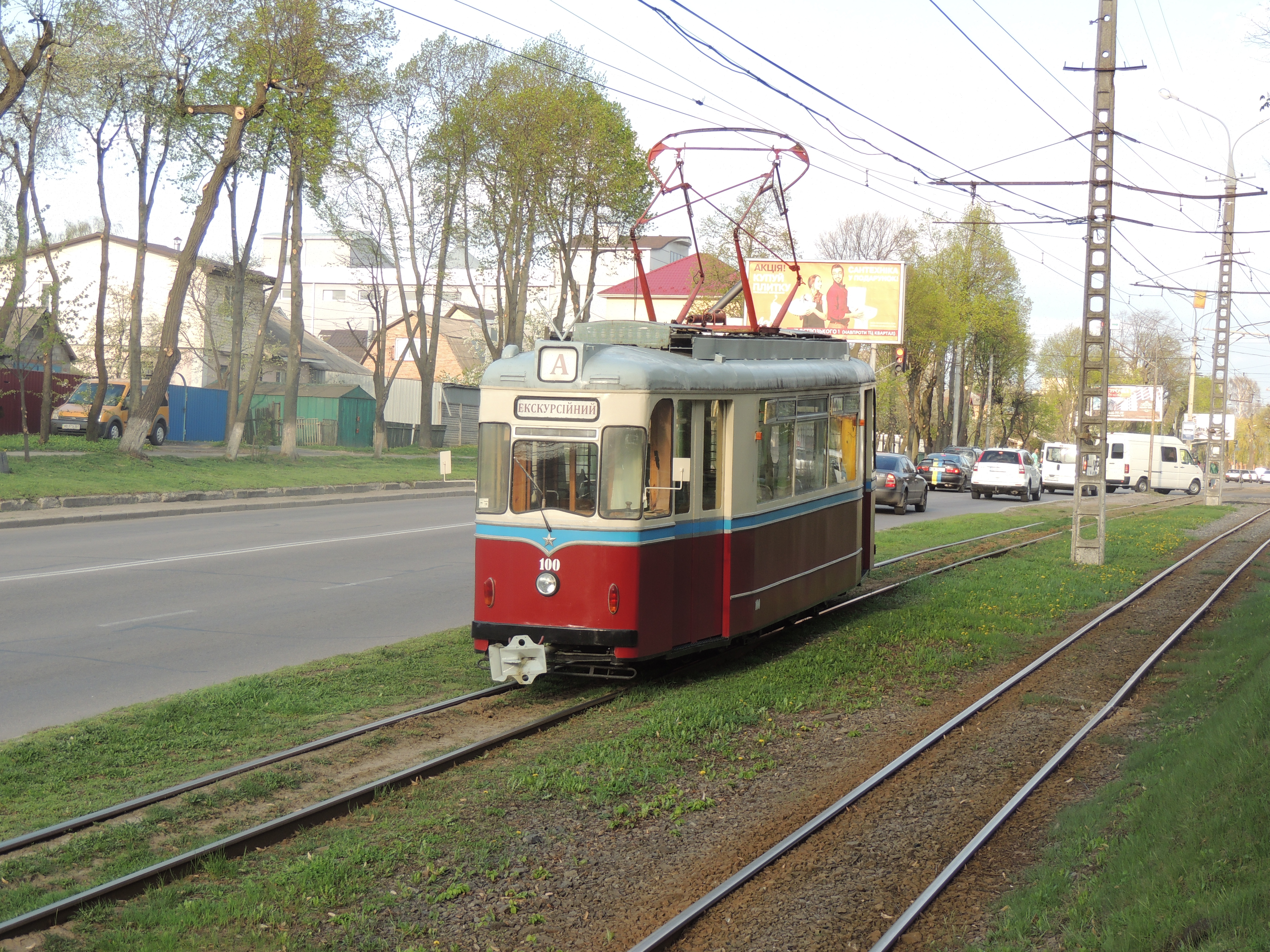 Gotha T57 №100